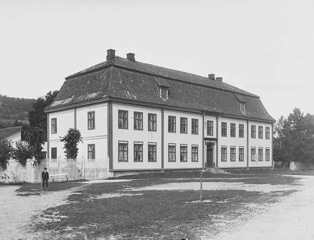 Kongsberg - Bergseminaret fra 1786 4. Aug. 1903